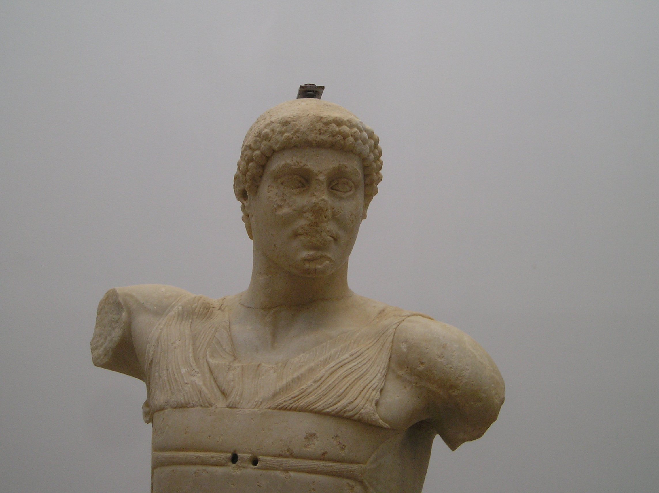 Motya